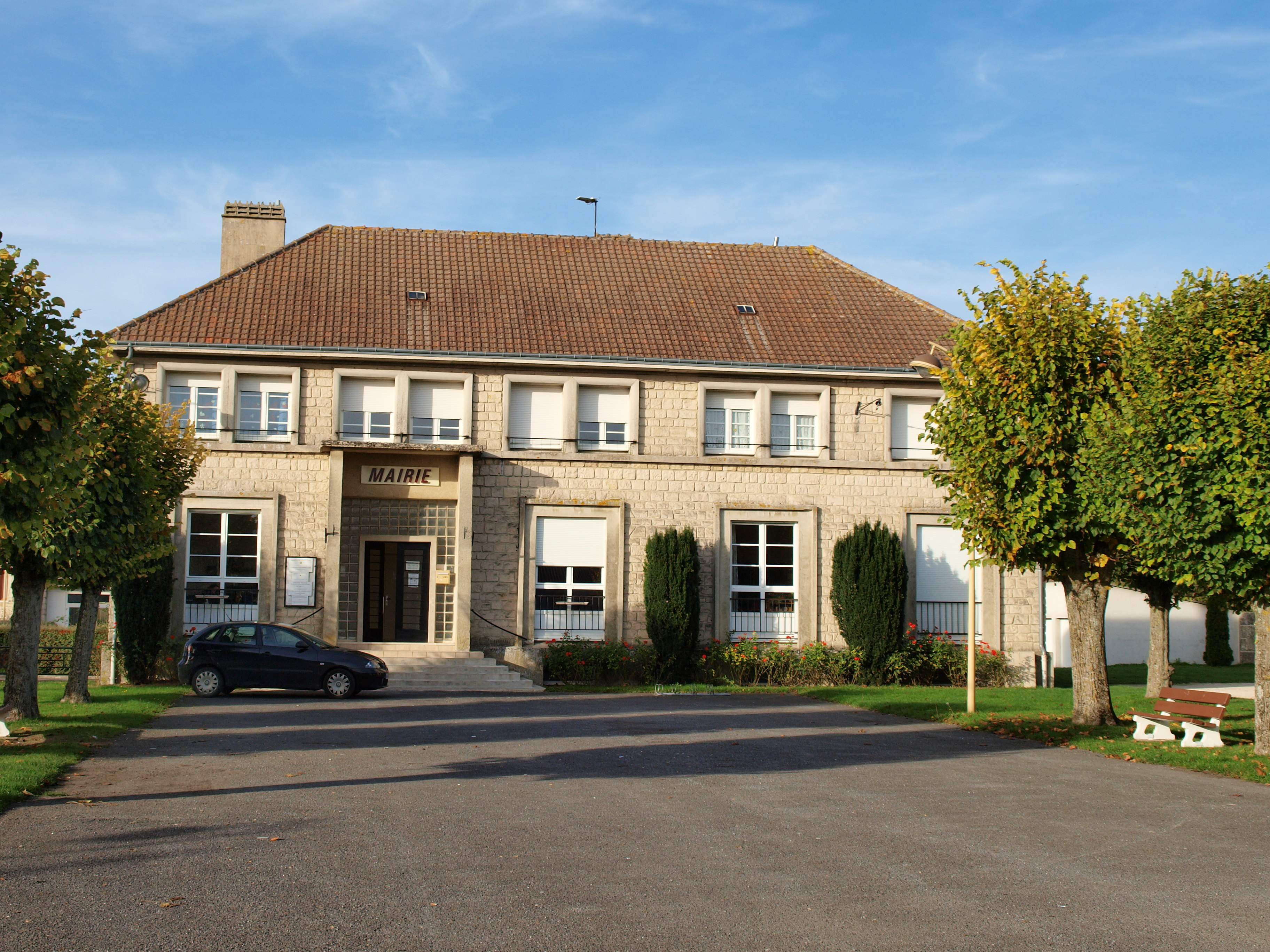 La Neuville-en-Tourne-à-Fuy (Ardennes, France)